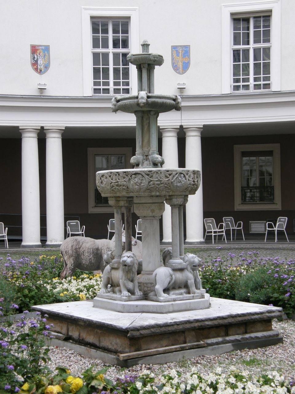 Venezianischer Löwenbrunnen (Künstler unbekannt). 1911 bis 1972 im Ausflugslokal Schloß Brüningslinden in Berlin-Kladow, von 1988 bis 2016 in Hof des Rathauses Wilmersdorf, Fehrbelliner Platz, Berlin-Wilmersdorf, seit 2016 auf dem Hof des Vereinshauses des Kladower Forums am Kladower Dorfplatz in Berlin-Kladow.